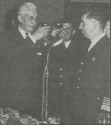 Arturo Illia comparte un brindis con el Brigadier General Carlos Armanini -titular de la aeronáutica- en un acto conmemorativo por el día de la Fuerza Aérea Argentina realizado en la Escuela de Aviación Militar.